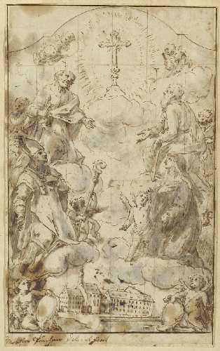 Melchior Buchner (1695-1758): Entwurf fur ein Altargemälde: Die Heiligen Petrus und Paulus sowie zwei weitere Heilige in Anbetung des Kreuzes, o.J.